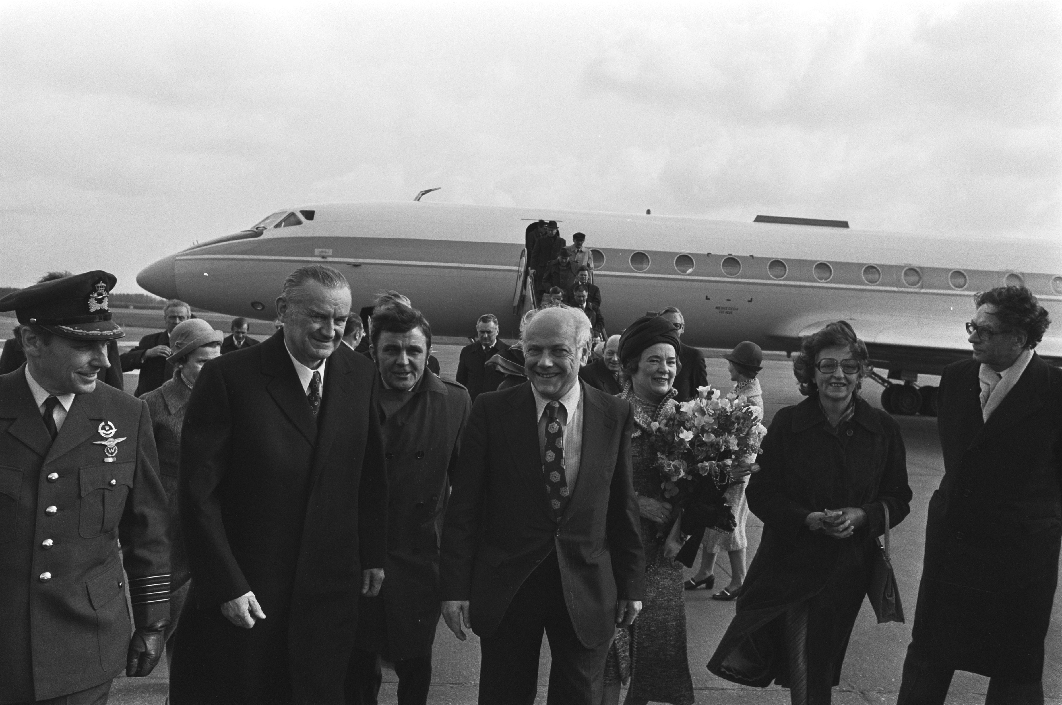 Collectie / Archief : Fotocollectie Anefo Reportage / Serie : Tweedaags bezoek Poolse premier Piotr Jaroszewicz aan Nederland Beschrijving : Premier Den Uyl begroet Jaroszewicz op Ypenburg, met echgenotes Datum : 14 maart 1977 Locatie : Den Haag, Zuid-Holland Trefwoorden : minister-presidenten, vliegtuigen, vliegvelden Persoonsnaam : Jaroszewicz, Piotr, Uyl, Joop den, Uyl, Liesbeth den Fotograaf : Verhoeff, Bert / Anefo Auteursrechthebbende : Nationaal Archief Materiaalsoort : Negatief (zwart/wit) Nummer archiefinventaris : bekijk toegang 2.24.01.05 Bestanddeelnummer : 929-0703